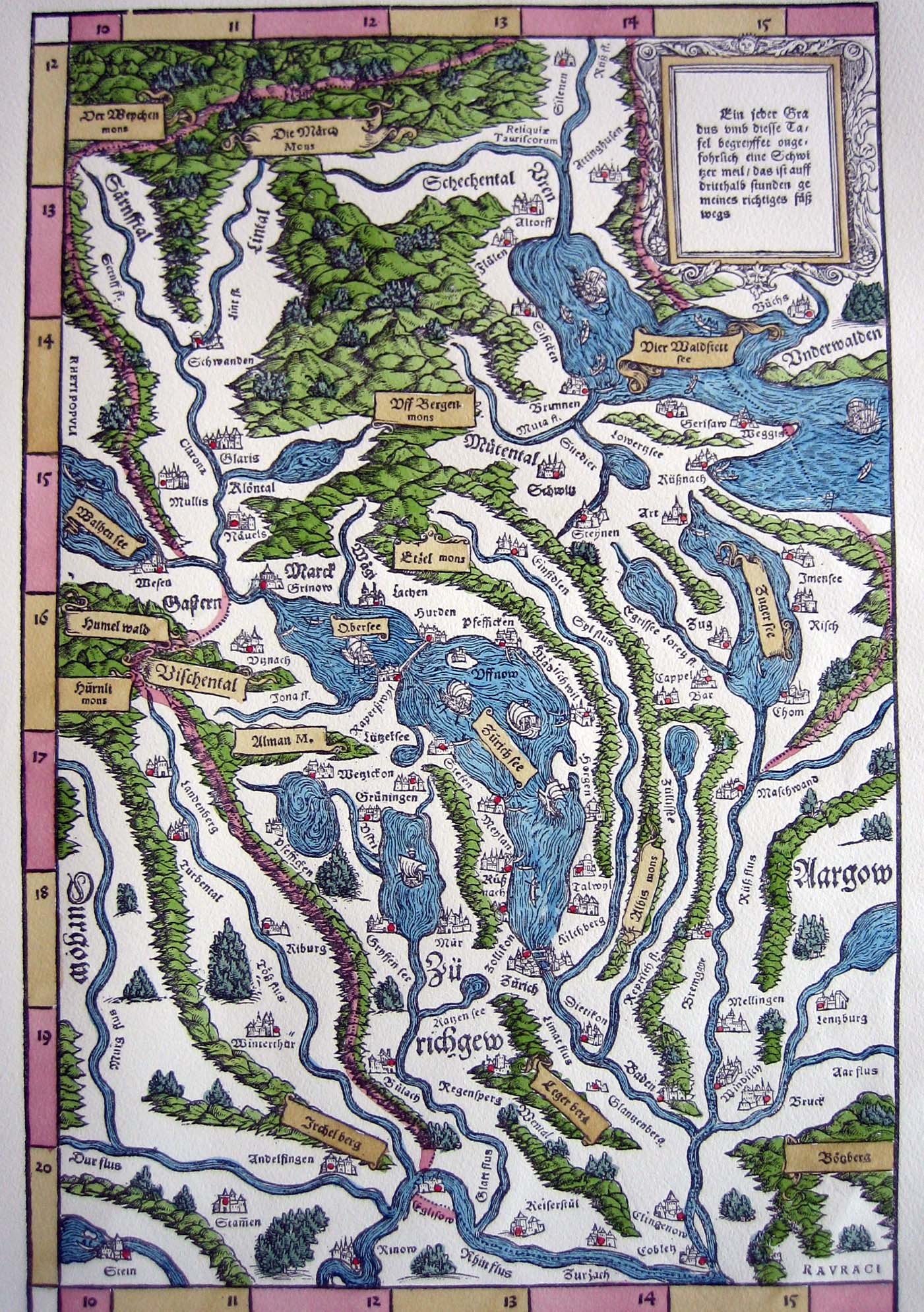 Der Zürichgau im 16. Jahrhundert. Ausschnitt aus der Schweizerkarte in der Stumpfschen Chronik